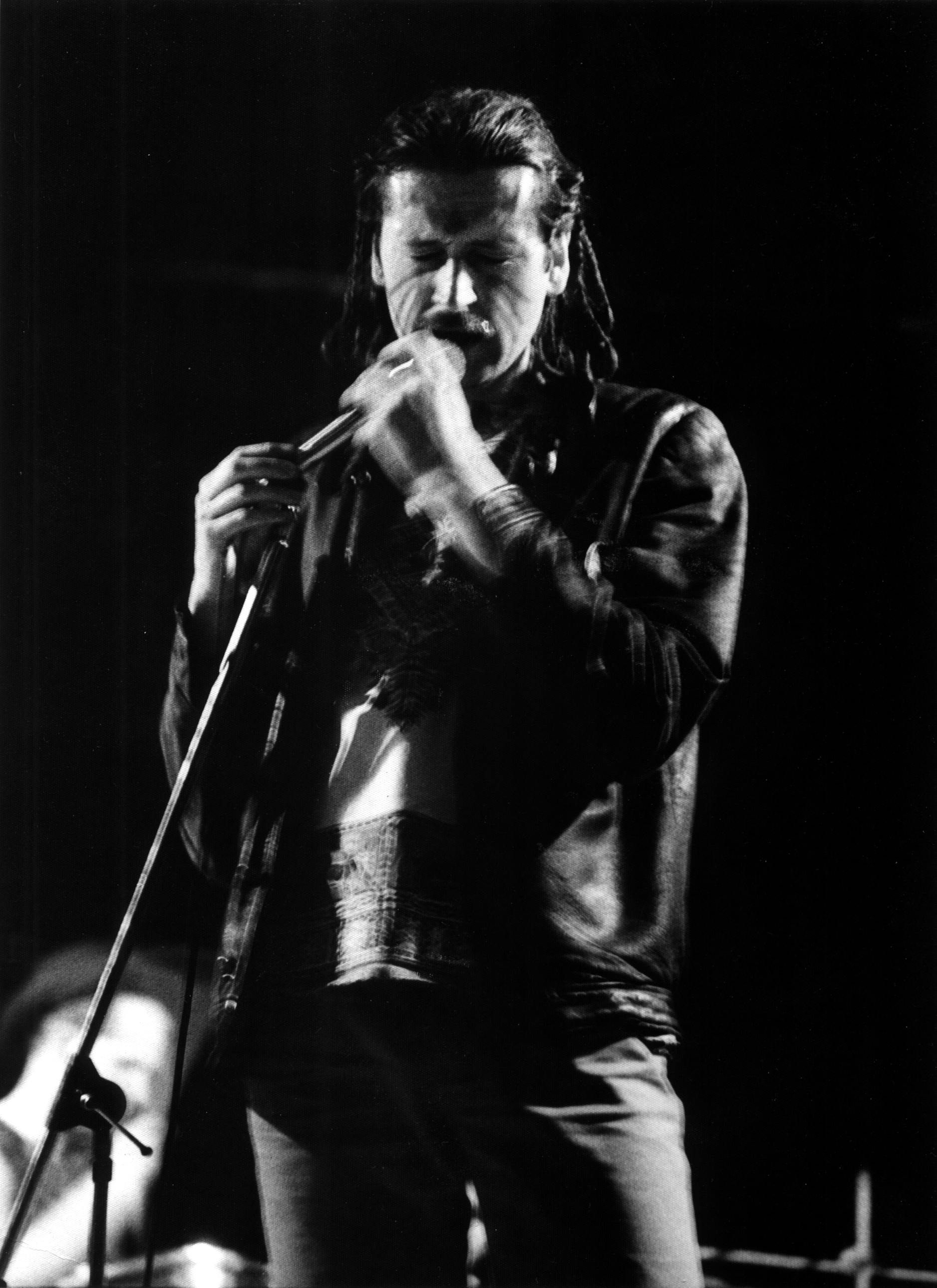 Fotografie Aleše Drvoty z archivu fotografa Martina Kouta, který mi předal všechny historické negativy. Praha 1985